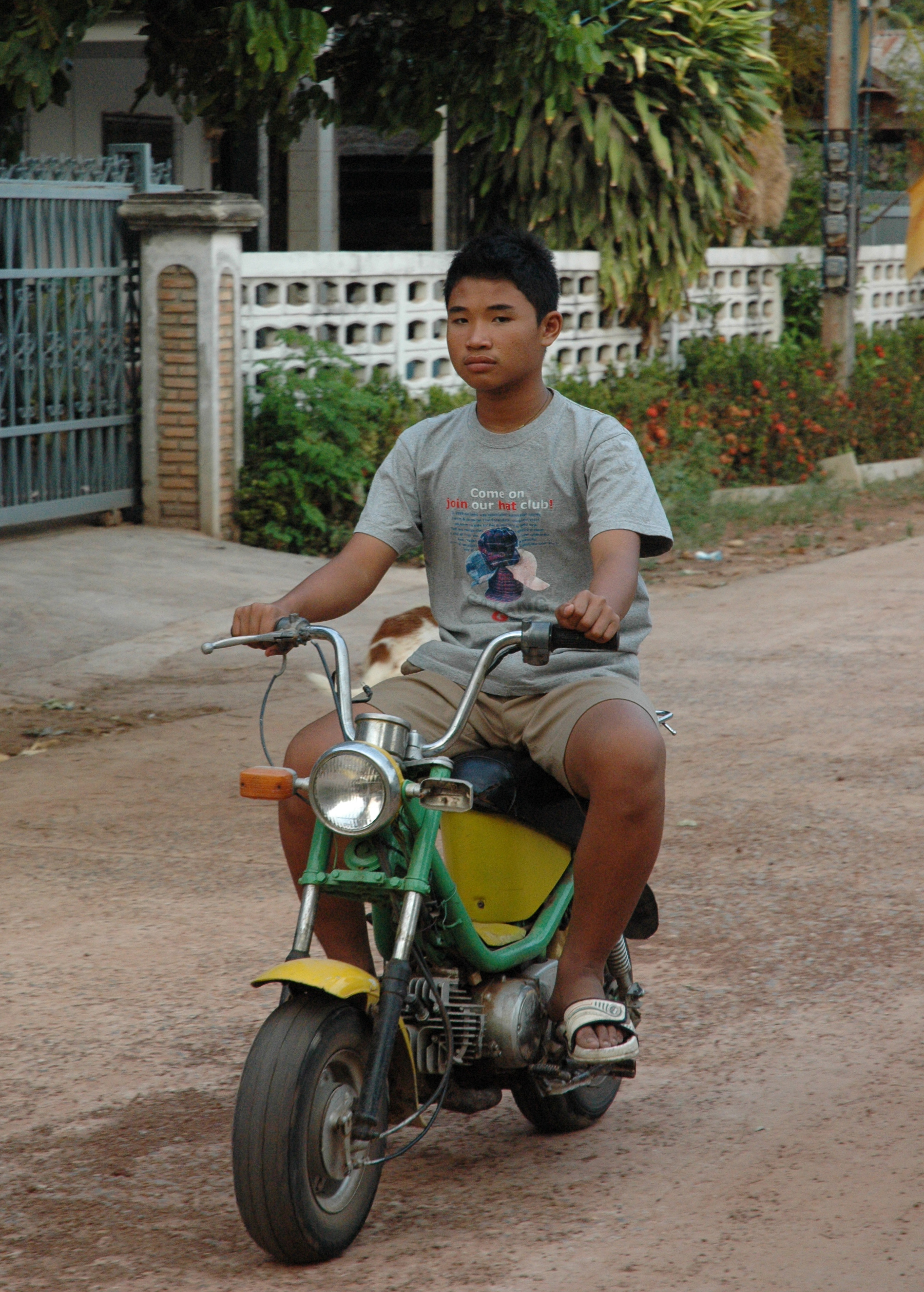 Teen on Mini-Bike - Yodakeng, Thailand